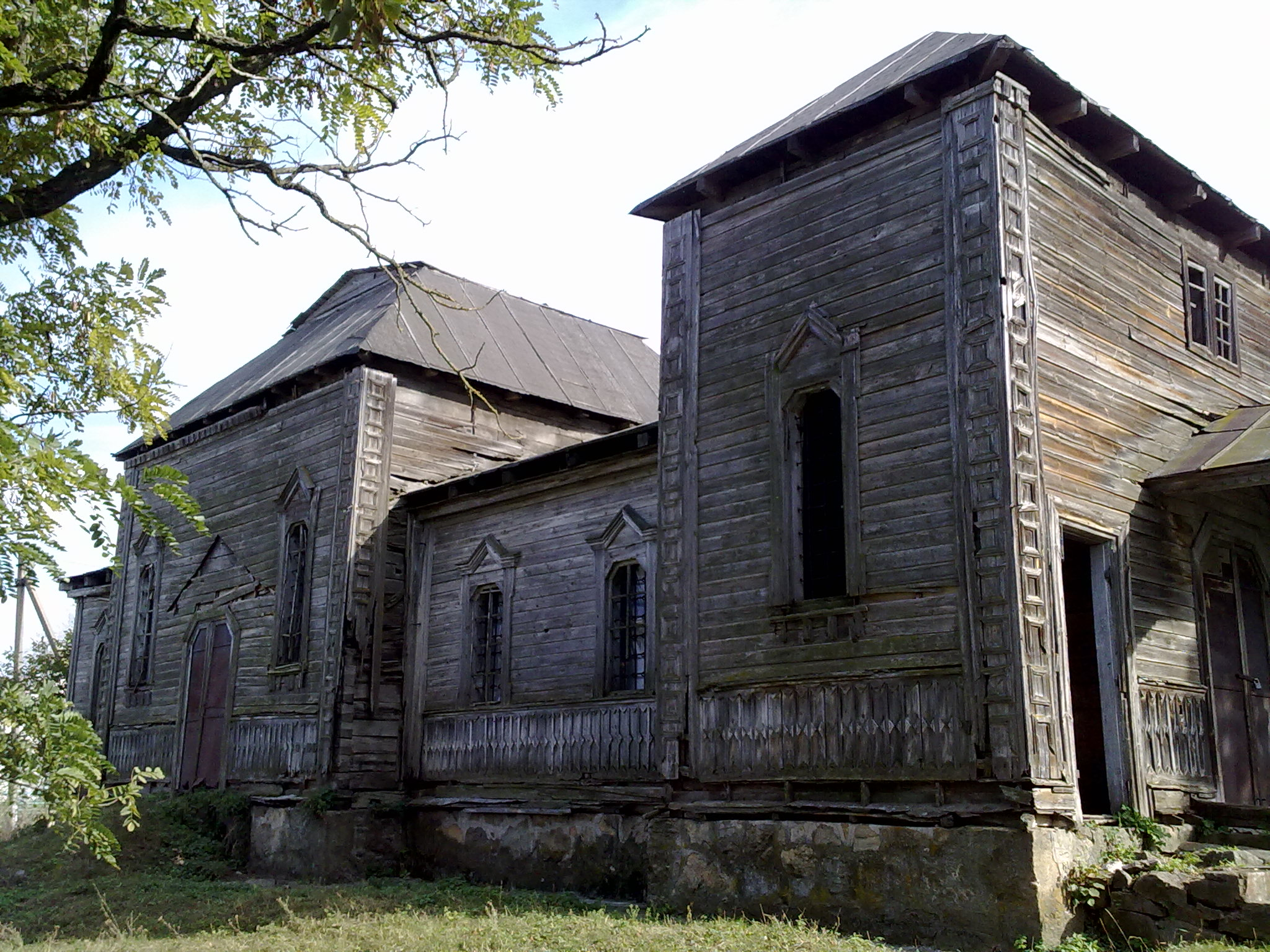 Пречистенська церква, Новоархангельський район, с. Ятрань, вул. Леніна